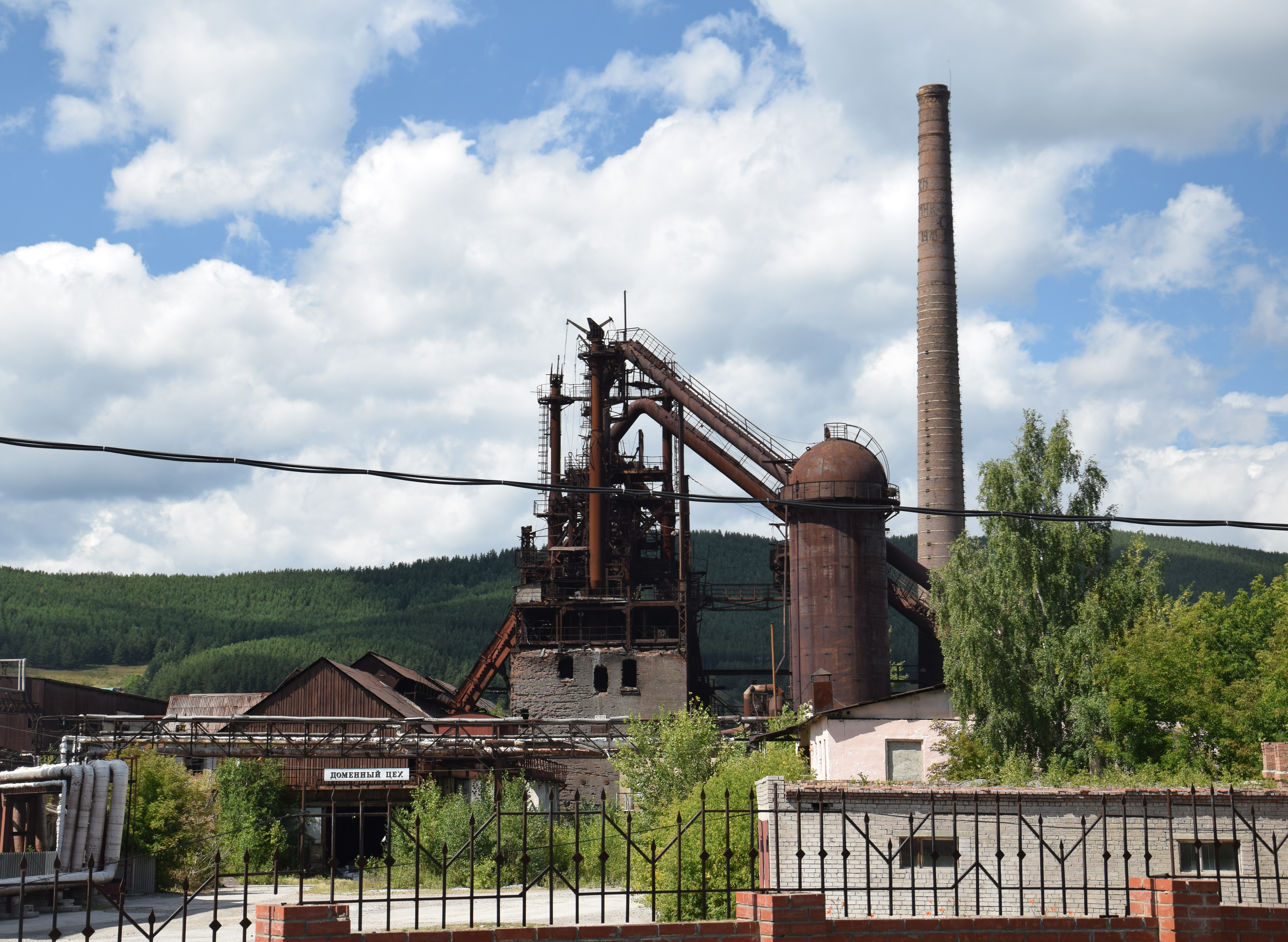 Белорецк